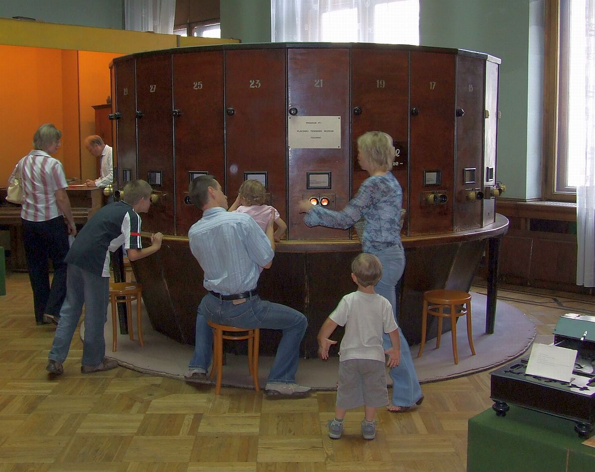 Fotoplastykon